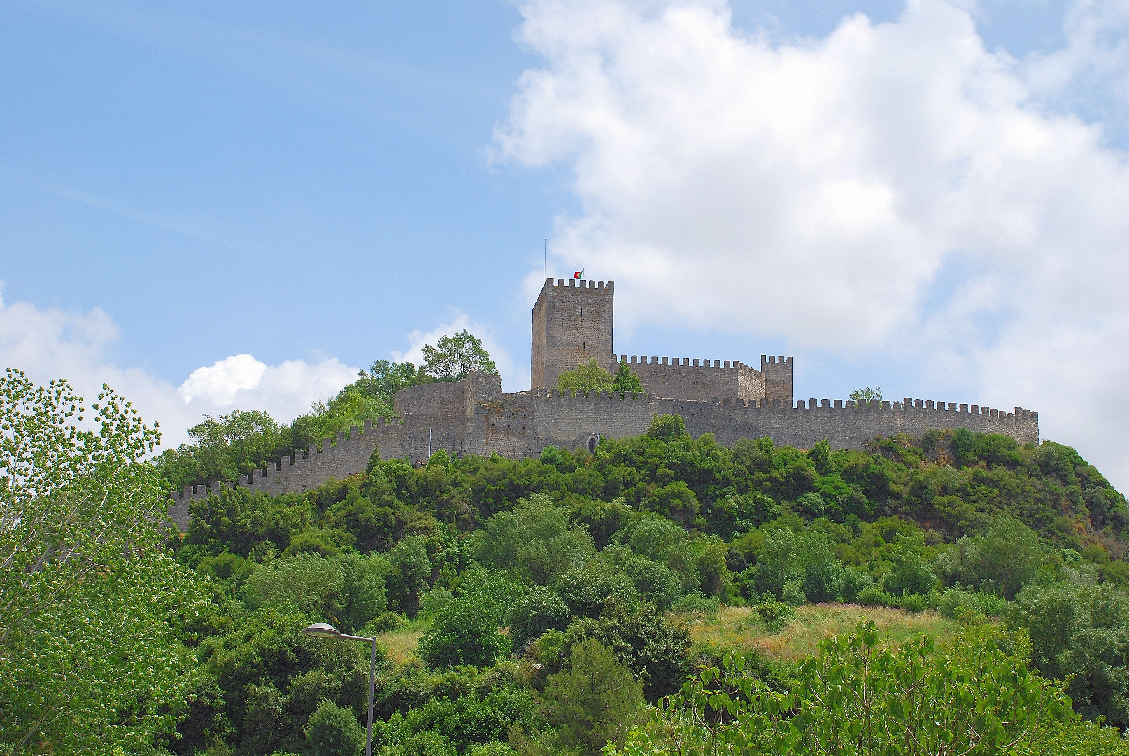 Leiria Castle, Portugal